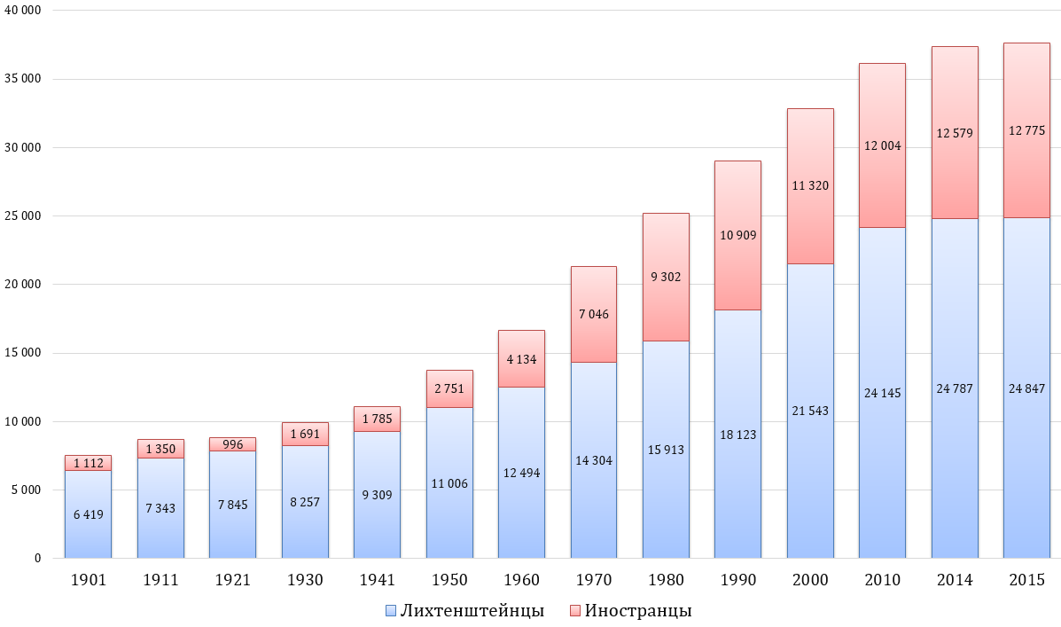 Соотношение лихтенштейнцев и иностранцев